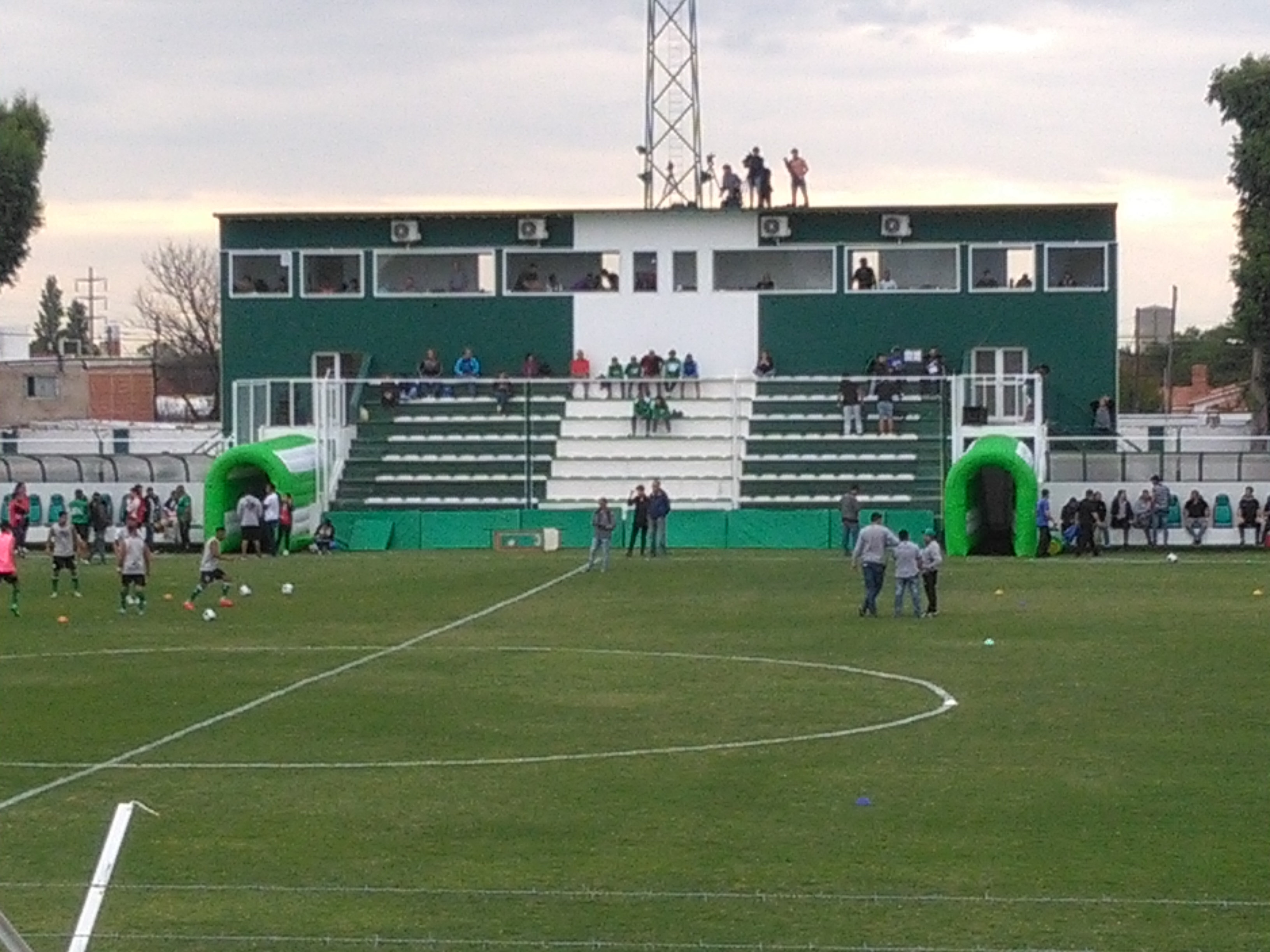 Platea alta y cabinas de transmisión del estadio de fútbol del Club Sportivo Estudiantes, provincia de San Luis, Argentina.